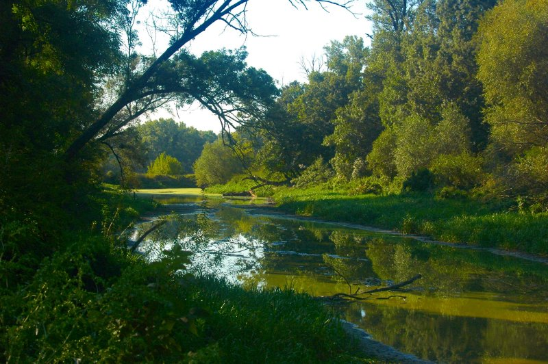 Morava river, abandoned meander in Slovakia